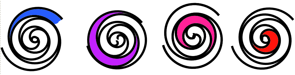 Scroll scrollcrompressor